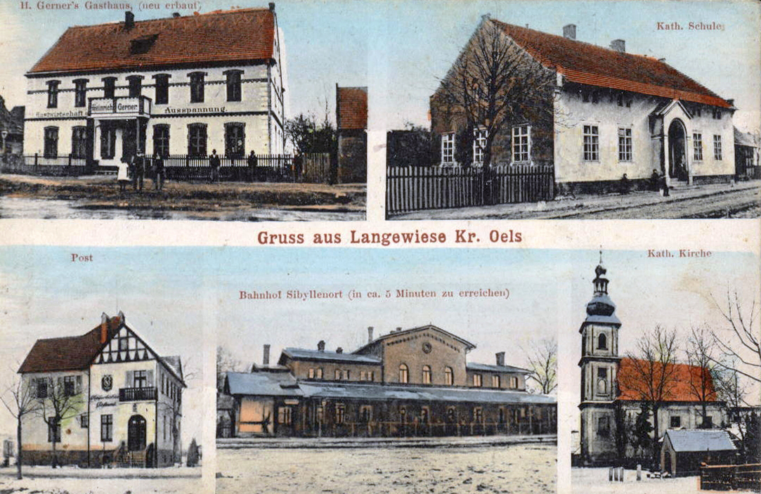 Długołęka